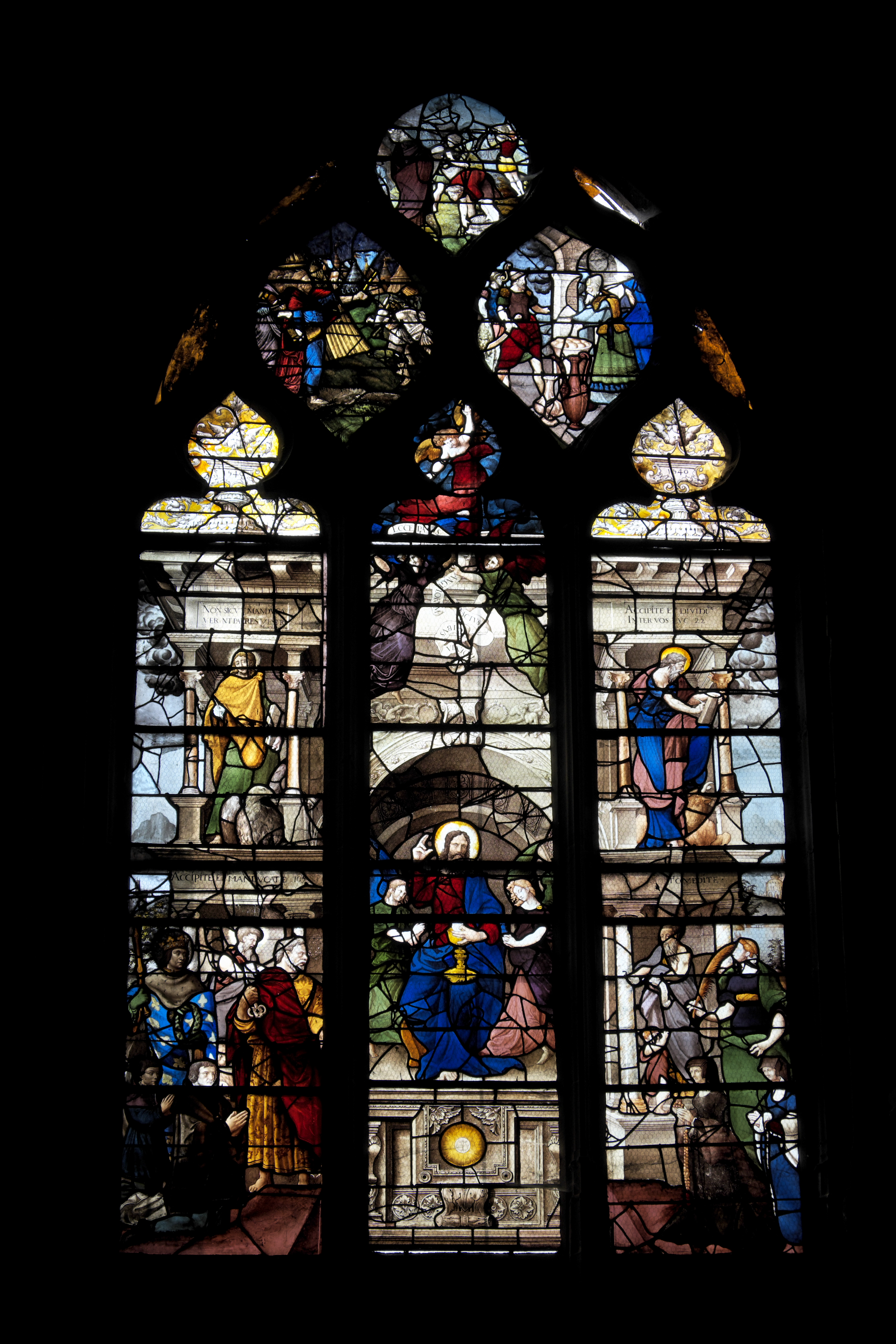 Katholische Kirche Sainte-Foy in Conches-en-Ouche im Département Eure (Haute-Normandie/Frankreich), Bleiglasfenster aus der 1. Hälfte des 16. Jahrhunderts; Darstellung: Einsetzung der Eucharistie